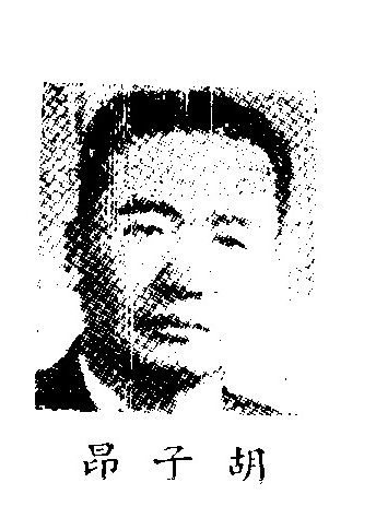 中文（中国大陆）: 制憲國民大會代表